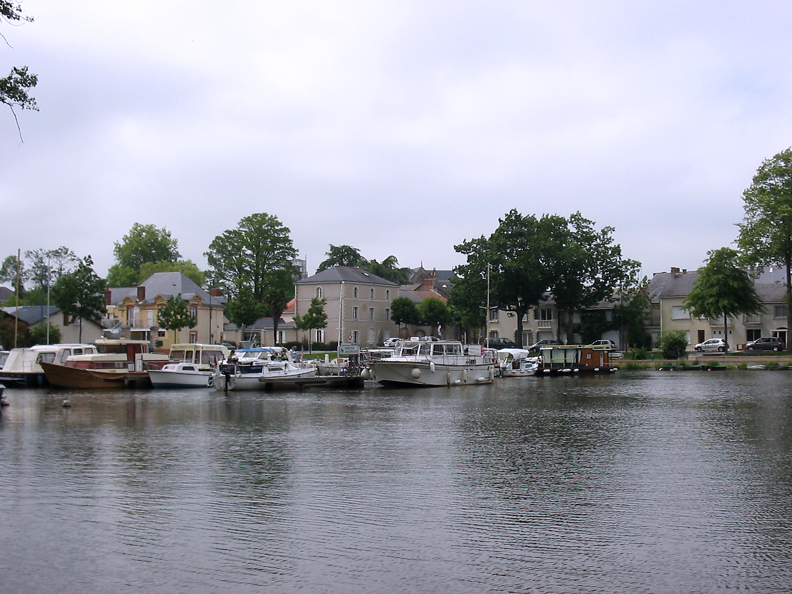 Der Hafen von Nort-sur-Erdre am Fluss Erdre / Frankreich